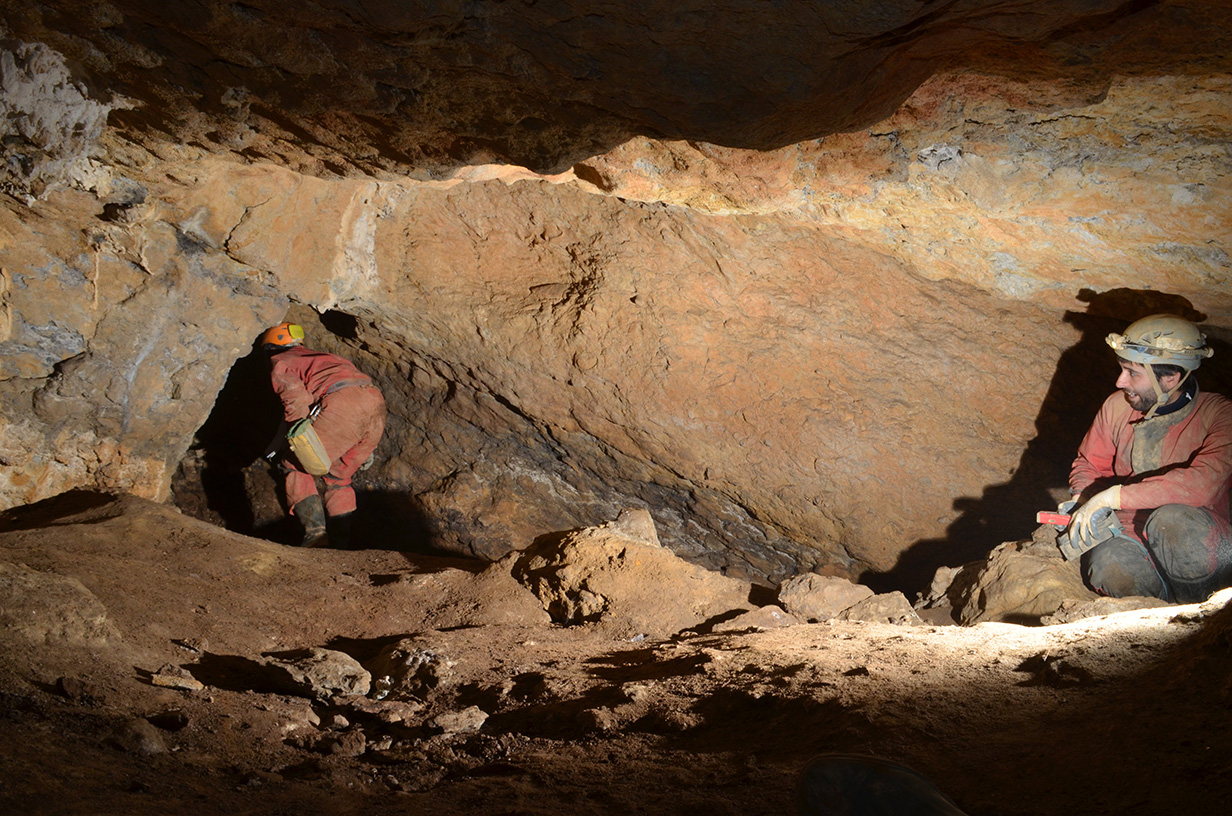 Antzoriz I edo Santa Katalina kobazuloaren barruko aldea.